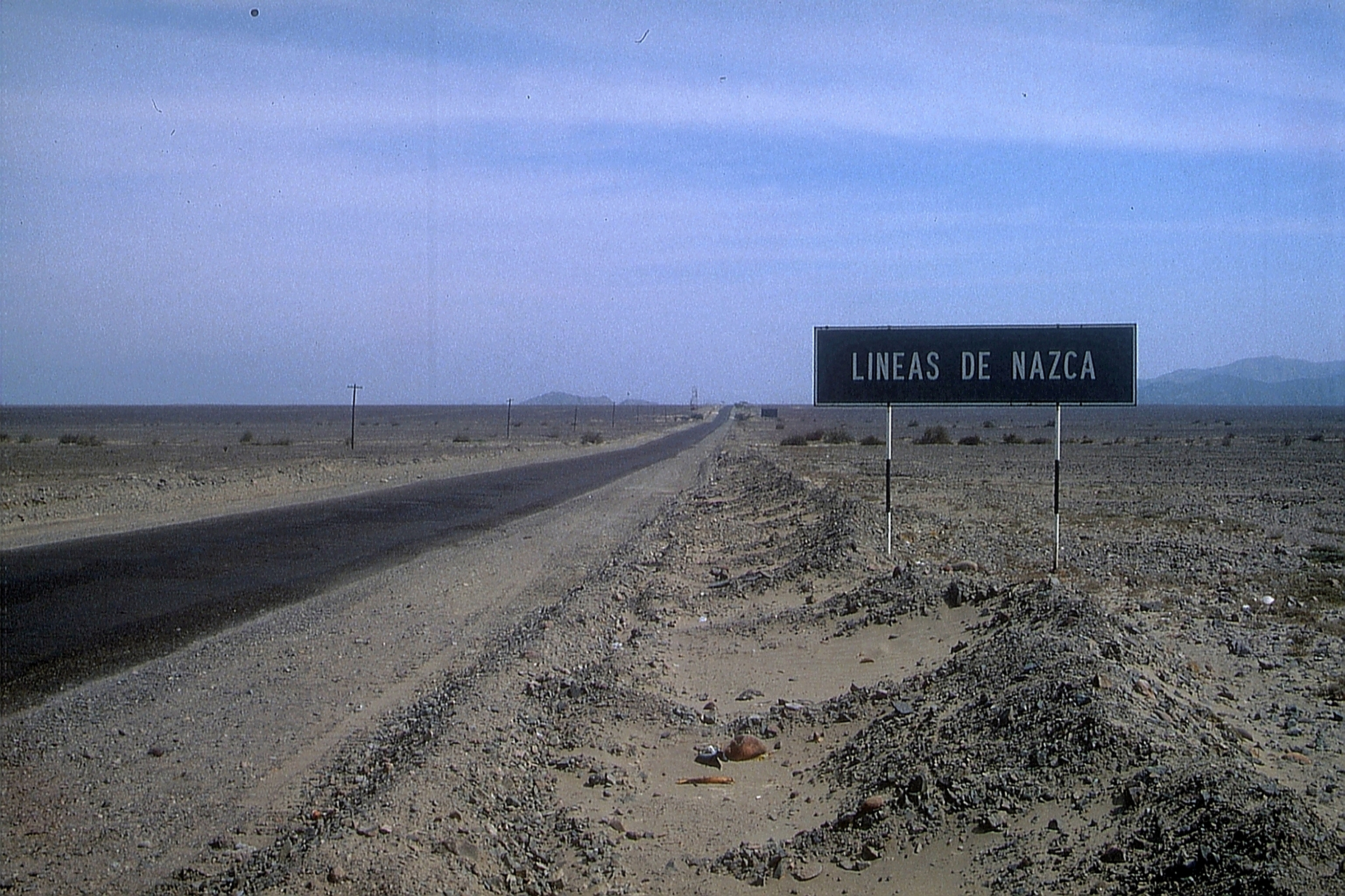 Panamericana bei den Linien von Nazca